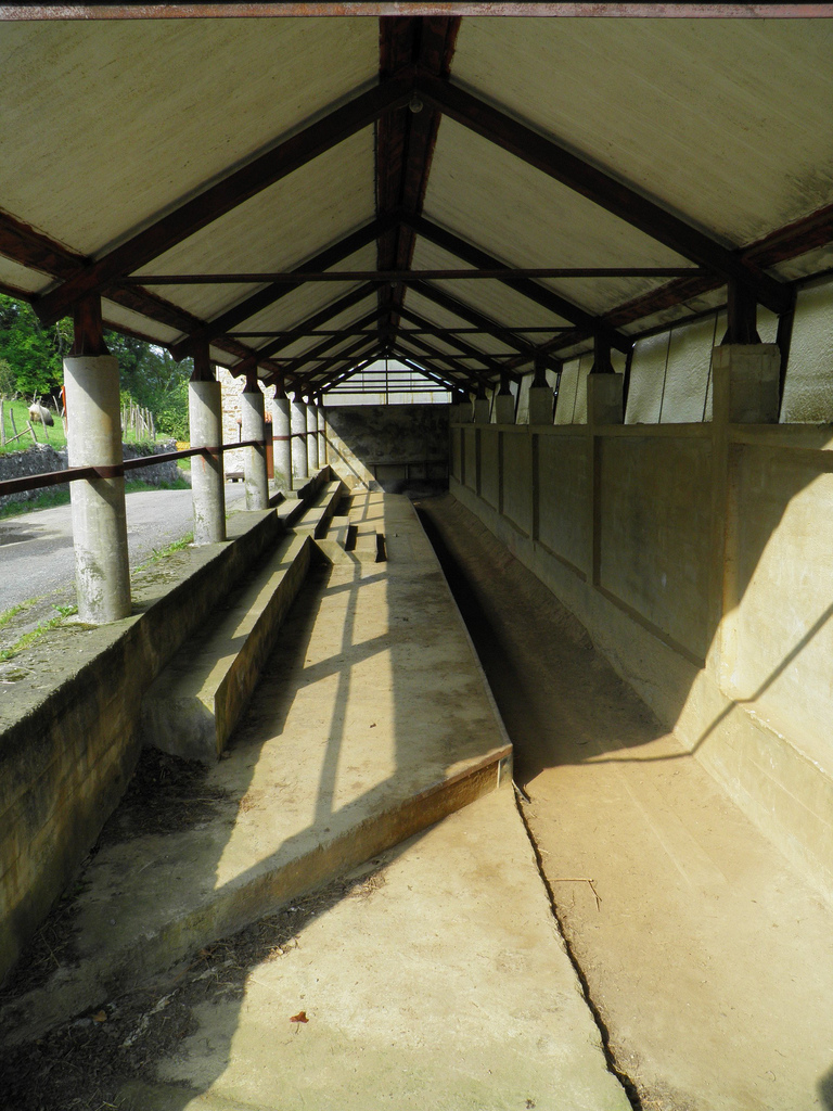 Aramaioko auzoko bolatokia, kanaleko hiru txirlo modalitatekoa, barrutik